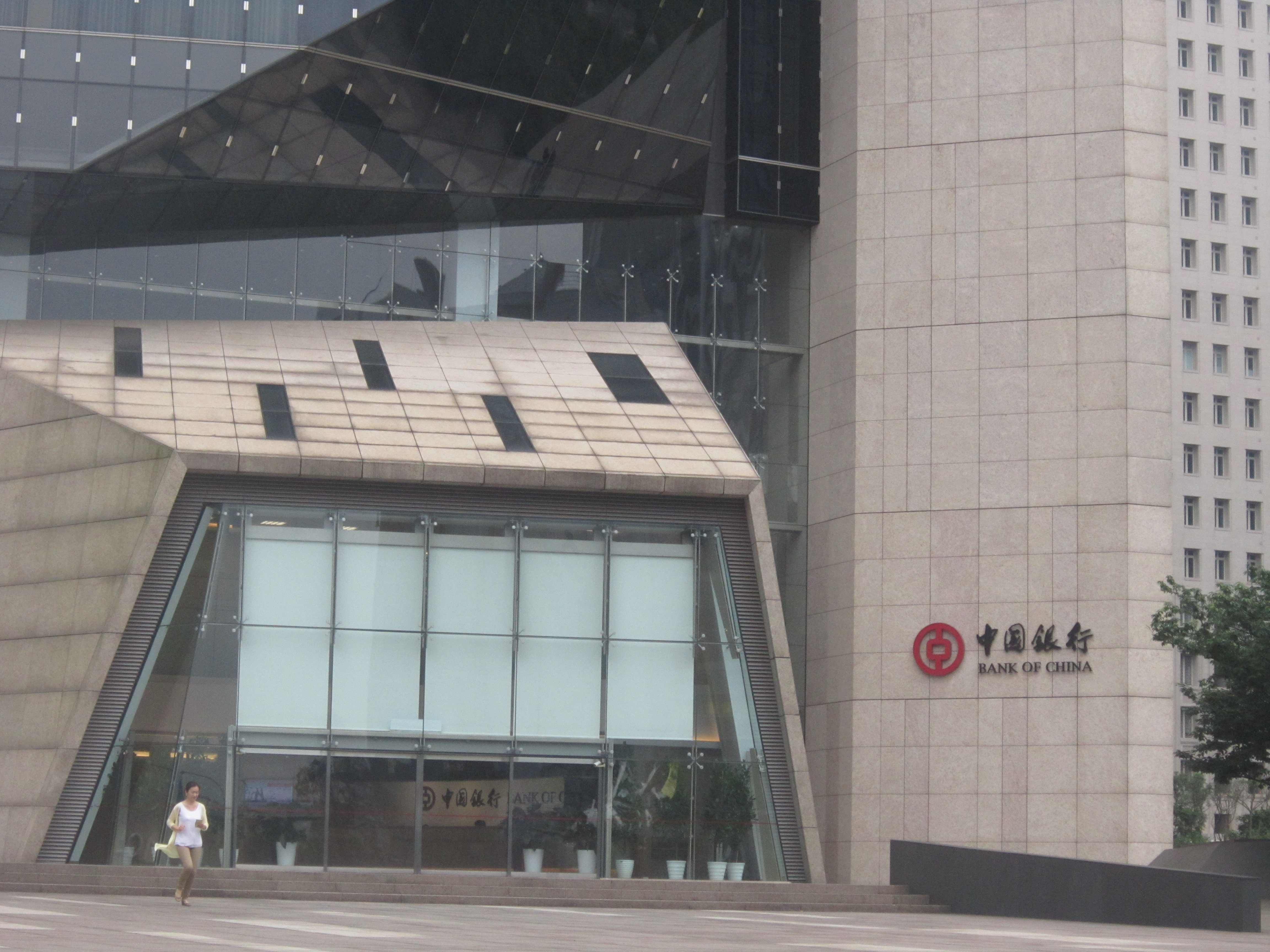 中國銀行台北分行，位於臺北市信義區松仁路105號1樓（克緹大樓）。